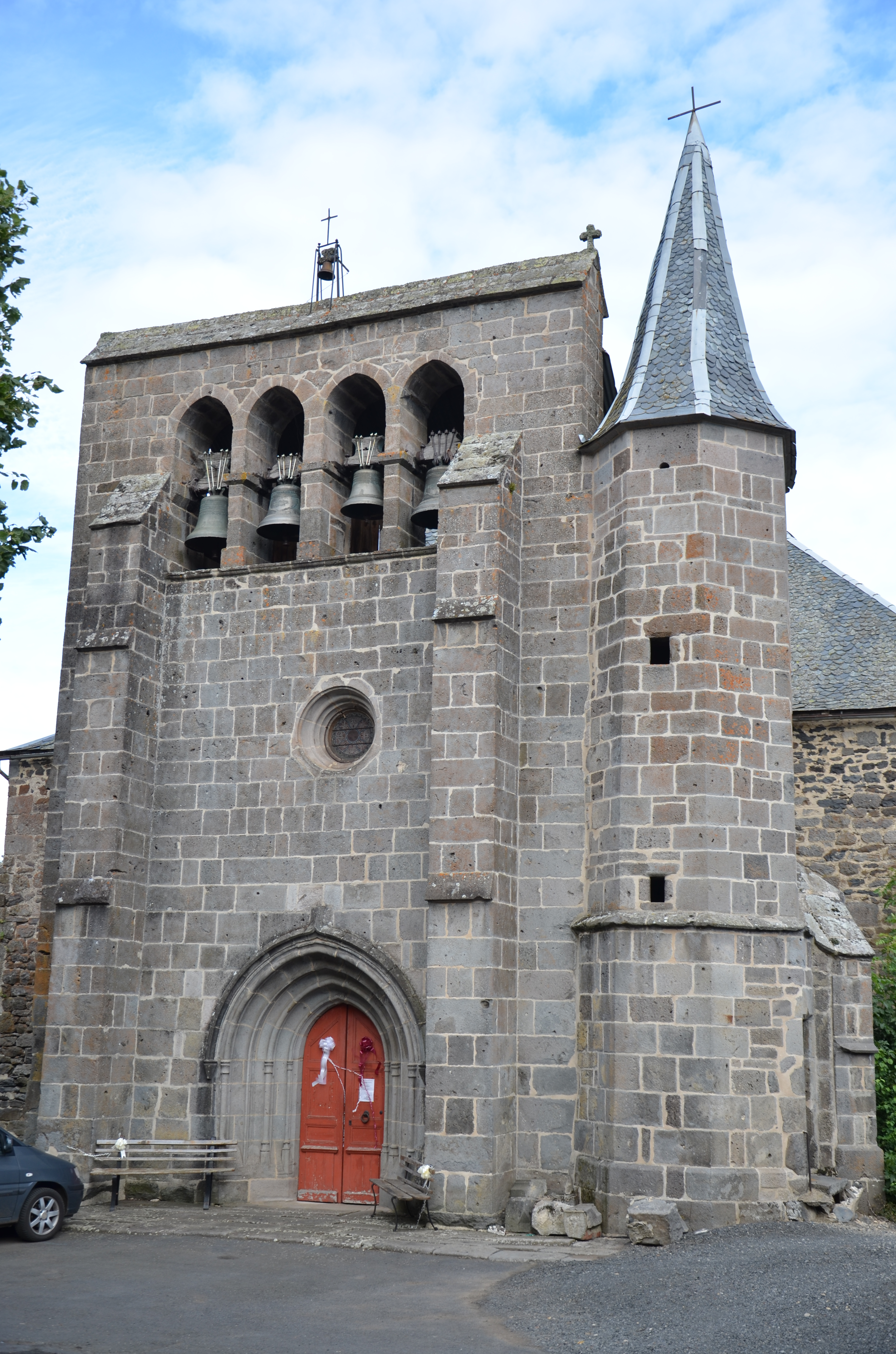 Façade de l'église Saint-Étienne de Joursac .